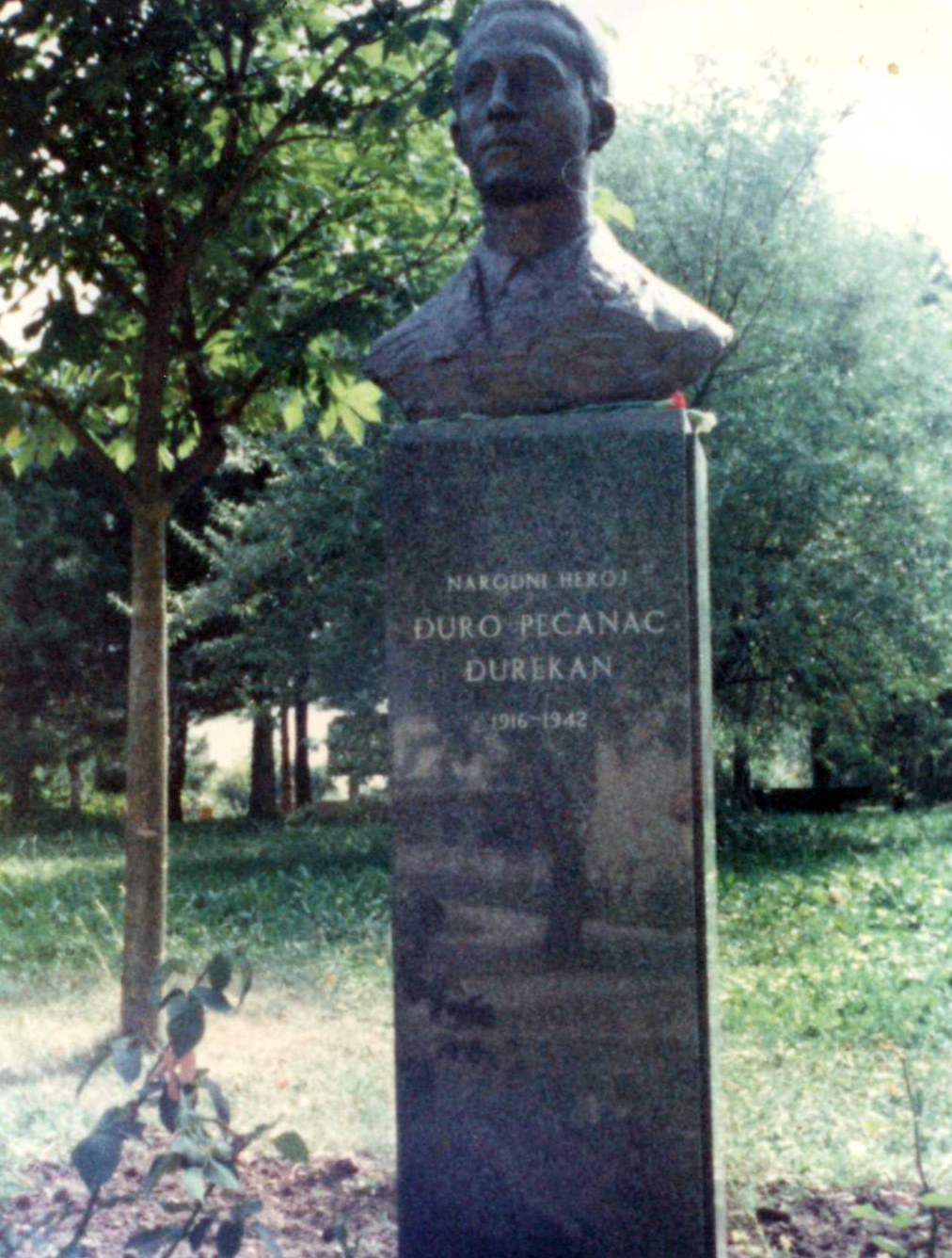 Pećanac Đuro Đurekan - bista u parku Heroja Bosanski Petrovac